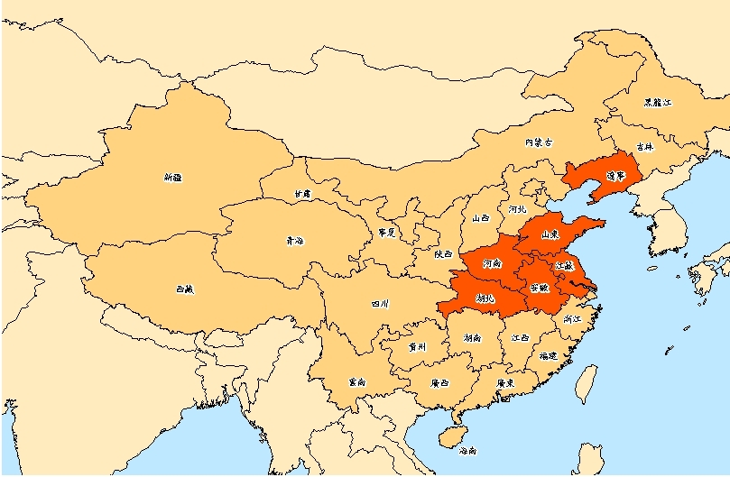 大陸地區發熱伴血小板減少綜合症個案分佈省份，包含遼寧、山東、湖南、江蘇、安徽、湖北六省